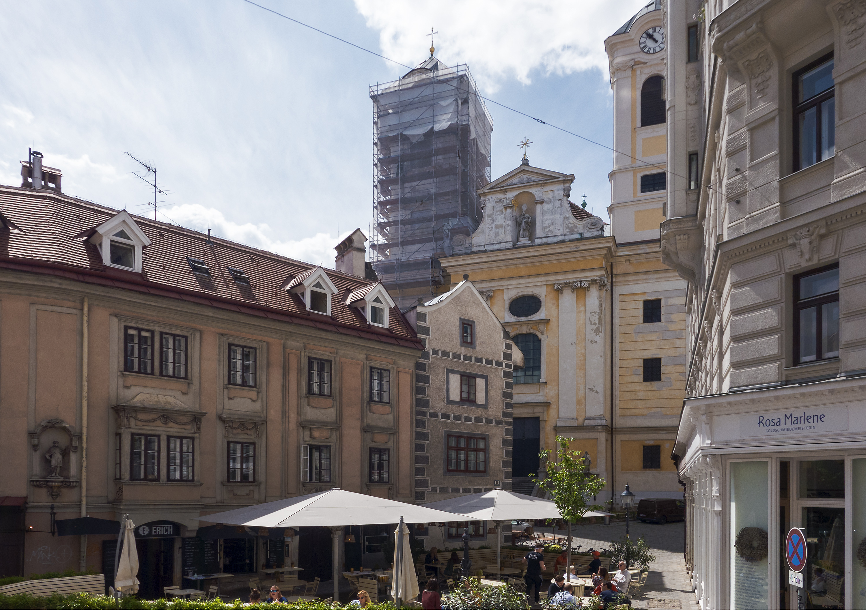 St.-Ulrichs-Platz in Wien 7